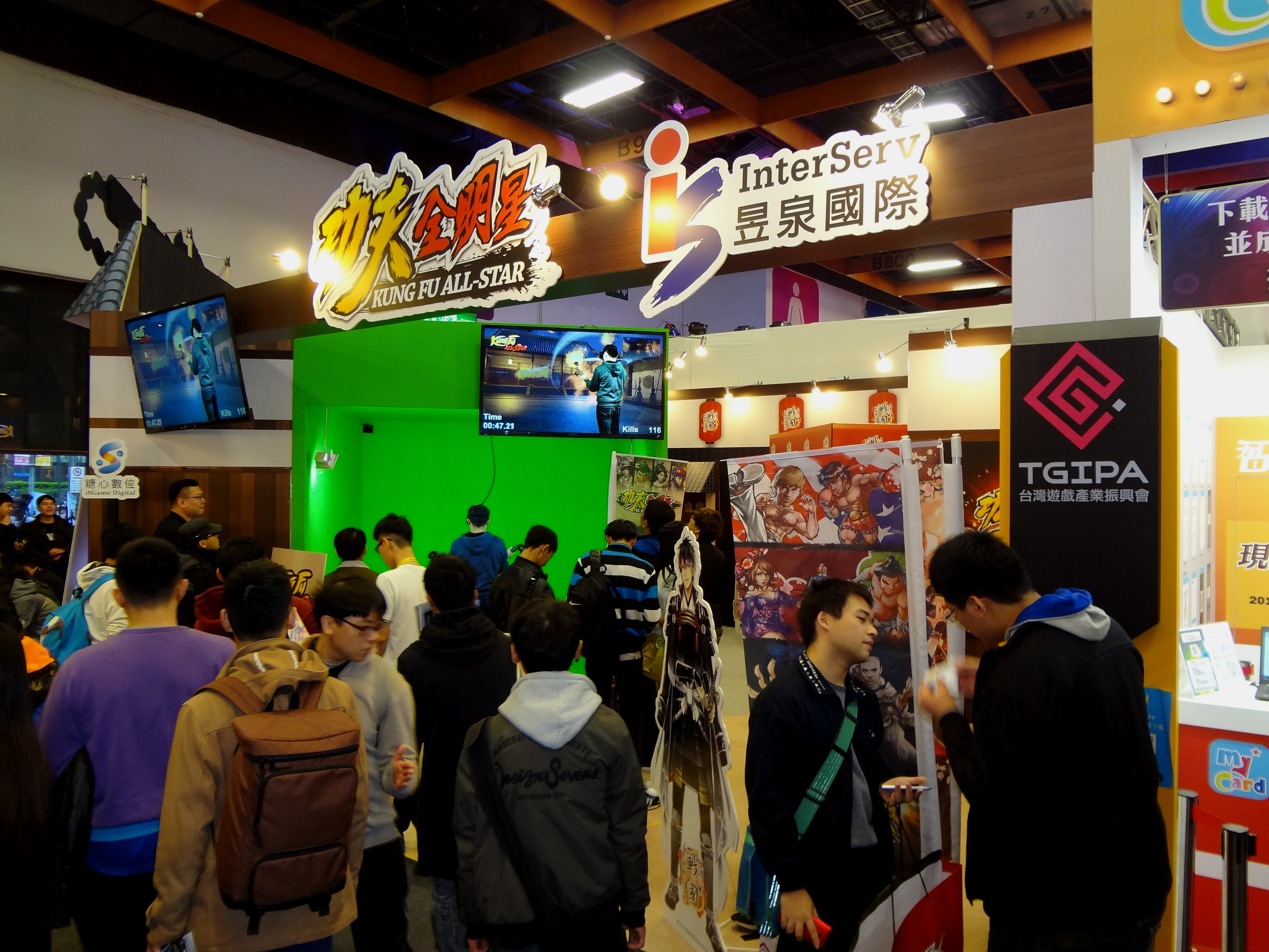 2017臺北國際電玩展，昱泉國際攤位。